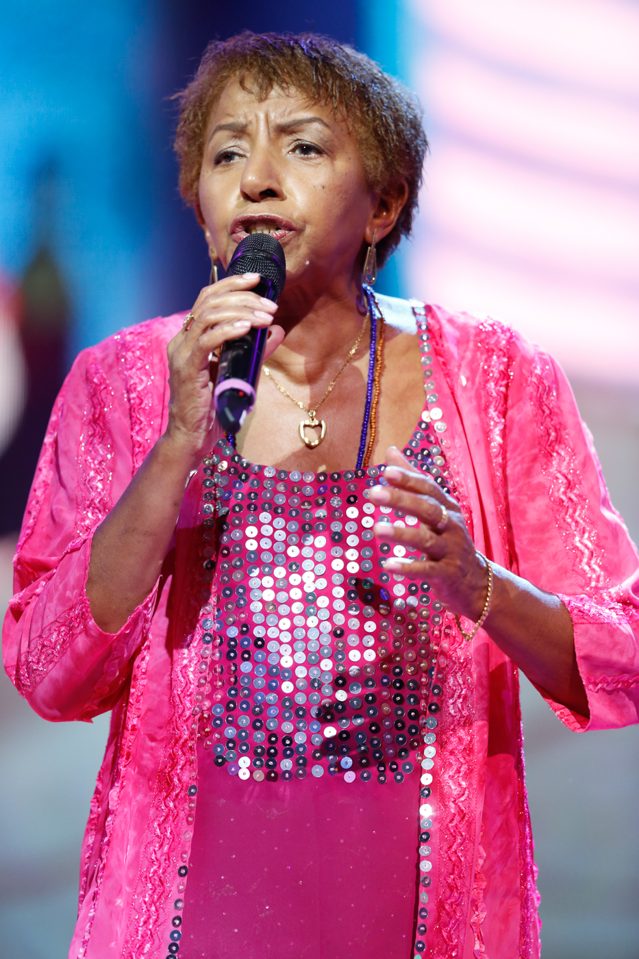 Leci Brandao durante o 25o Premio da Musica Brasileira no Theatro Municipal. Foto: Roberto Filho (14/05/14)